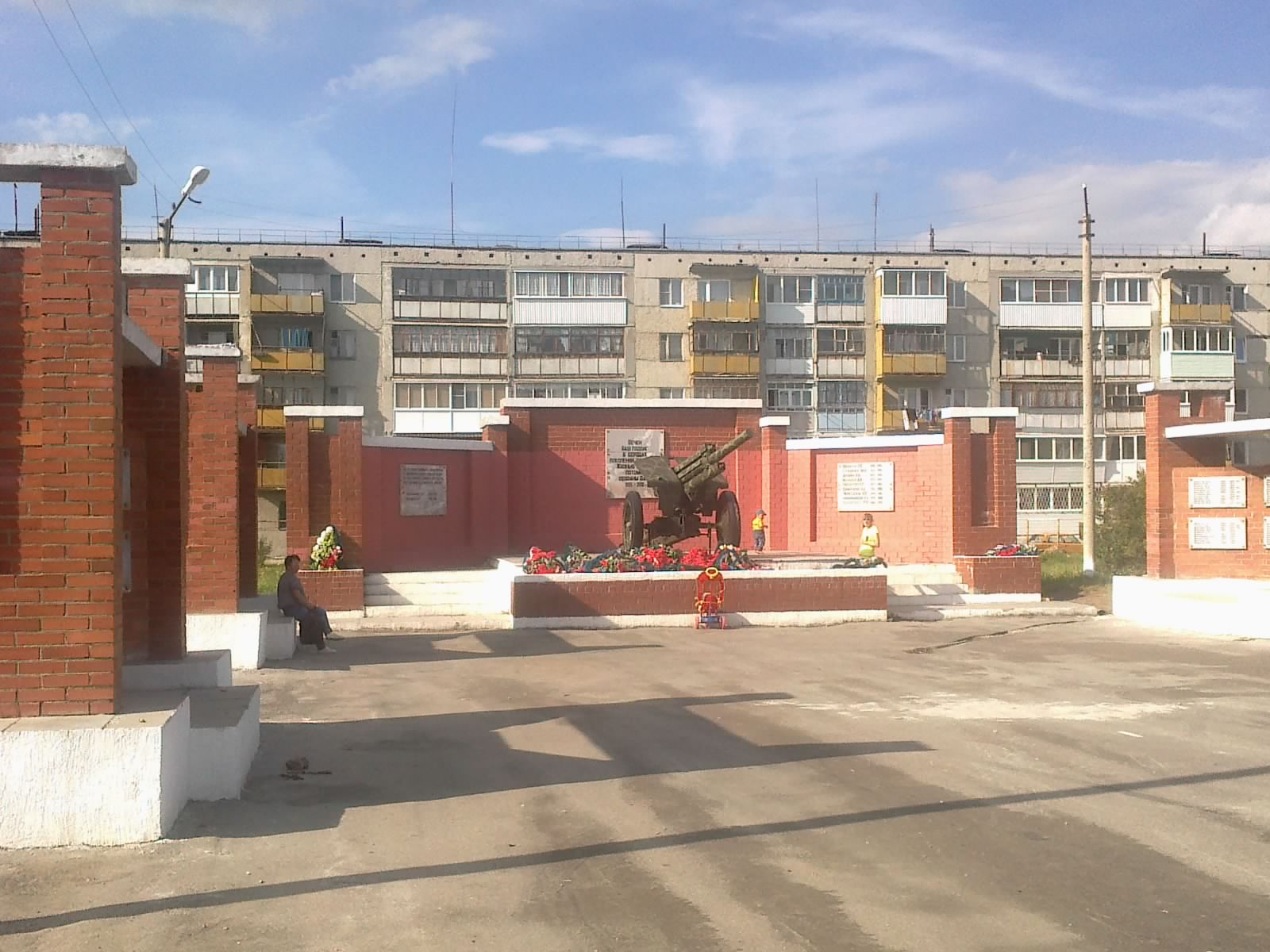 Военный мемориал в Богдановиче